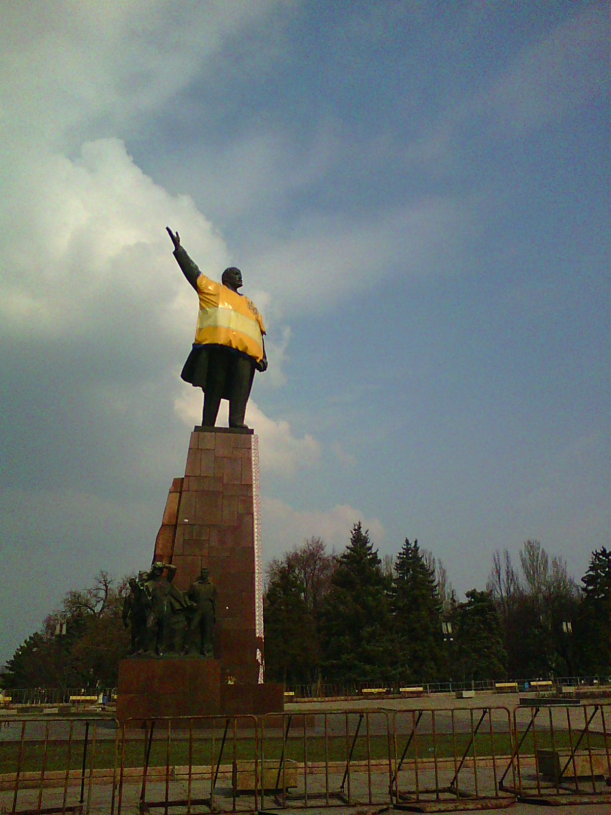 Запорожье